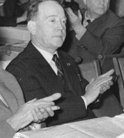 Berlin, IV. VBK-Kongress, Nagel, Hartfield Zentralbild Hesse 1.12.1959 IV. Kongress des Verbandes Bildender Künstler eröffnet Der IV. Kongress des Verbandes Bildender Künstler Deutschlands wurde am 1. Dezember 1959 in Leipzig eröffnet. UBz: Der Präsident der Deutschen Akademie der Künste, Prof. Nagel (links) und John Heartfield (2. von links). Abgebildete Personen: Nagel, Otto Prof.: Maler, Präsident der Akademie der Künste (AdK), Nationalpreisträger, Vaterländischer Verdienstorden (VVO) in Gold, DDR (GND 118586300)